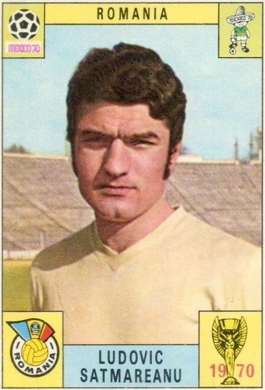 Lajos (Ludovic) Sătmăreanu